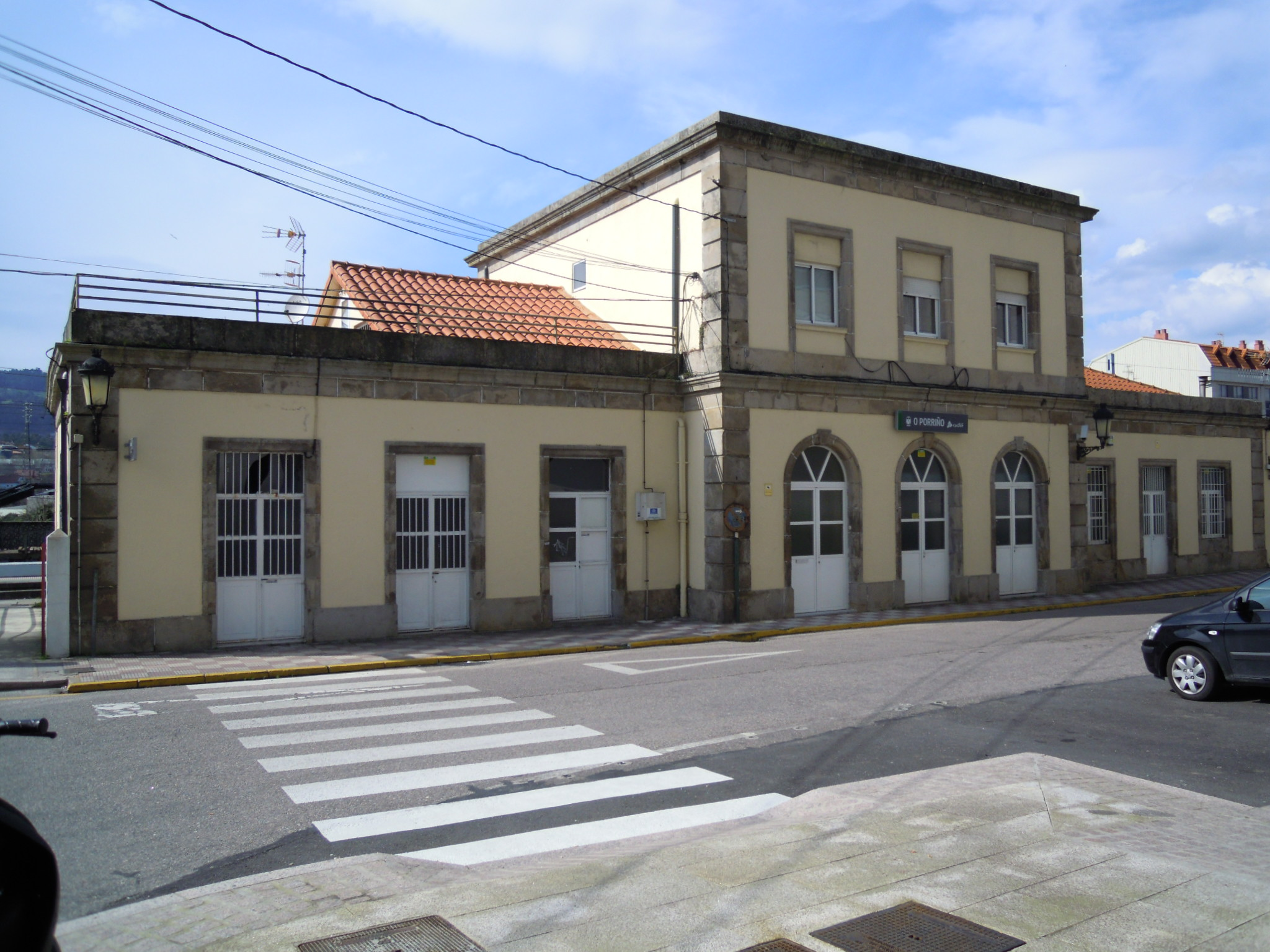 Estación de ferrocarril do Porriño, Galicia, España.